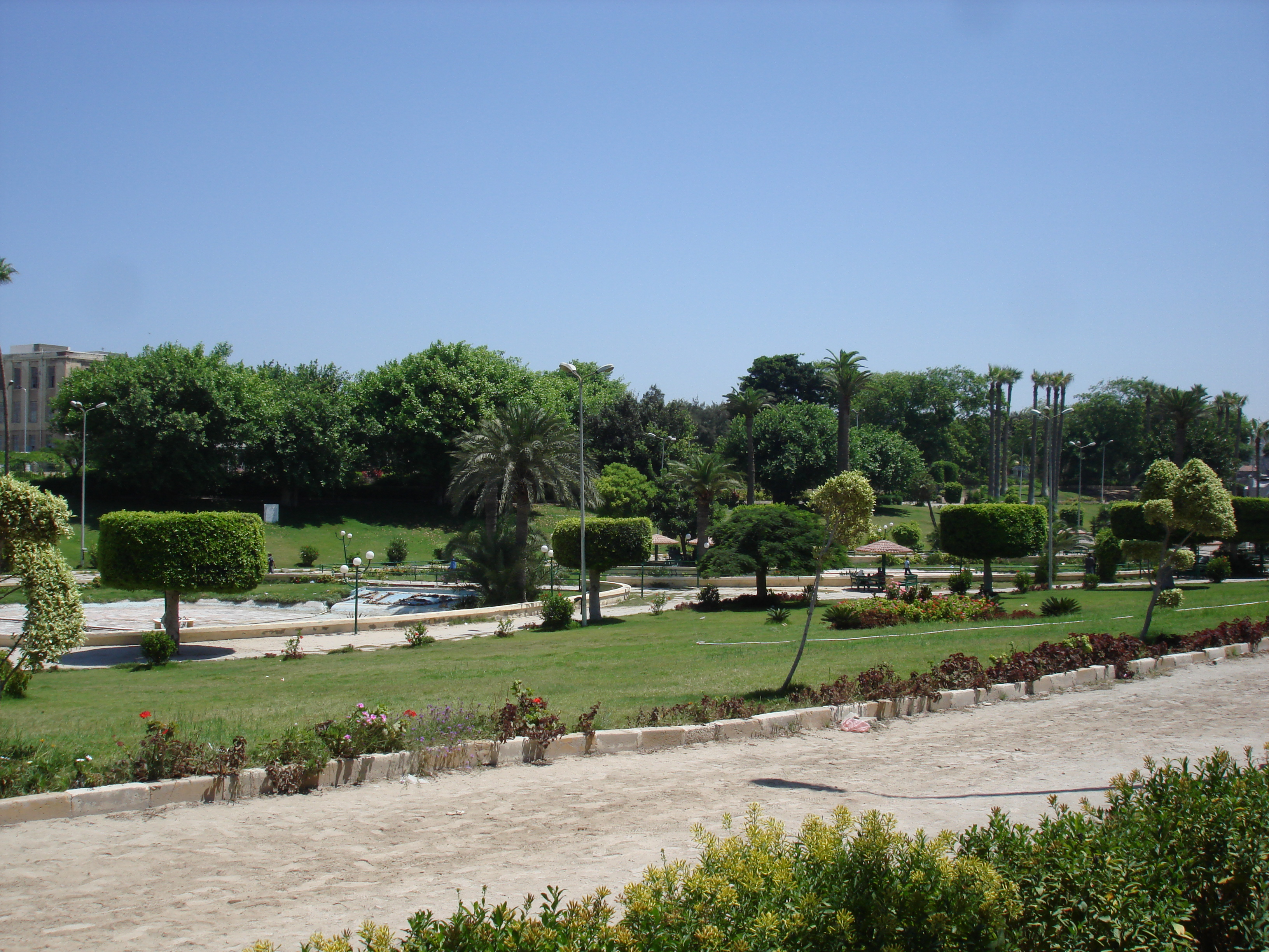 Shalalat gardens